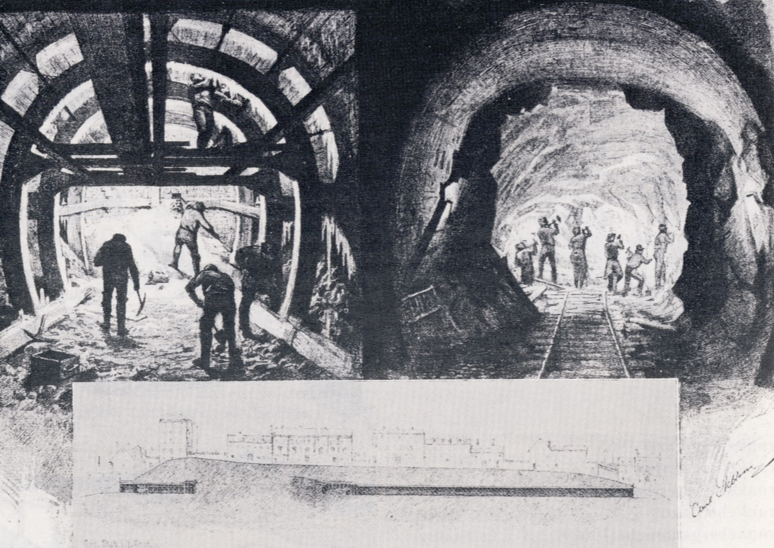 Brunkebergstunneln byggs, Stockholm, illustration 1886